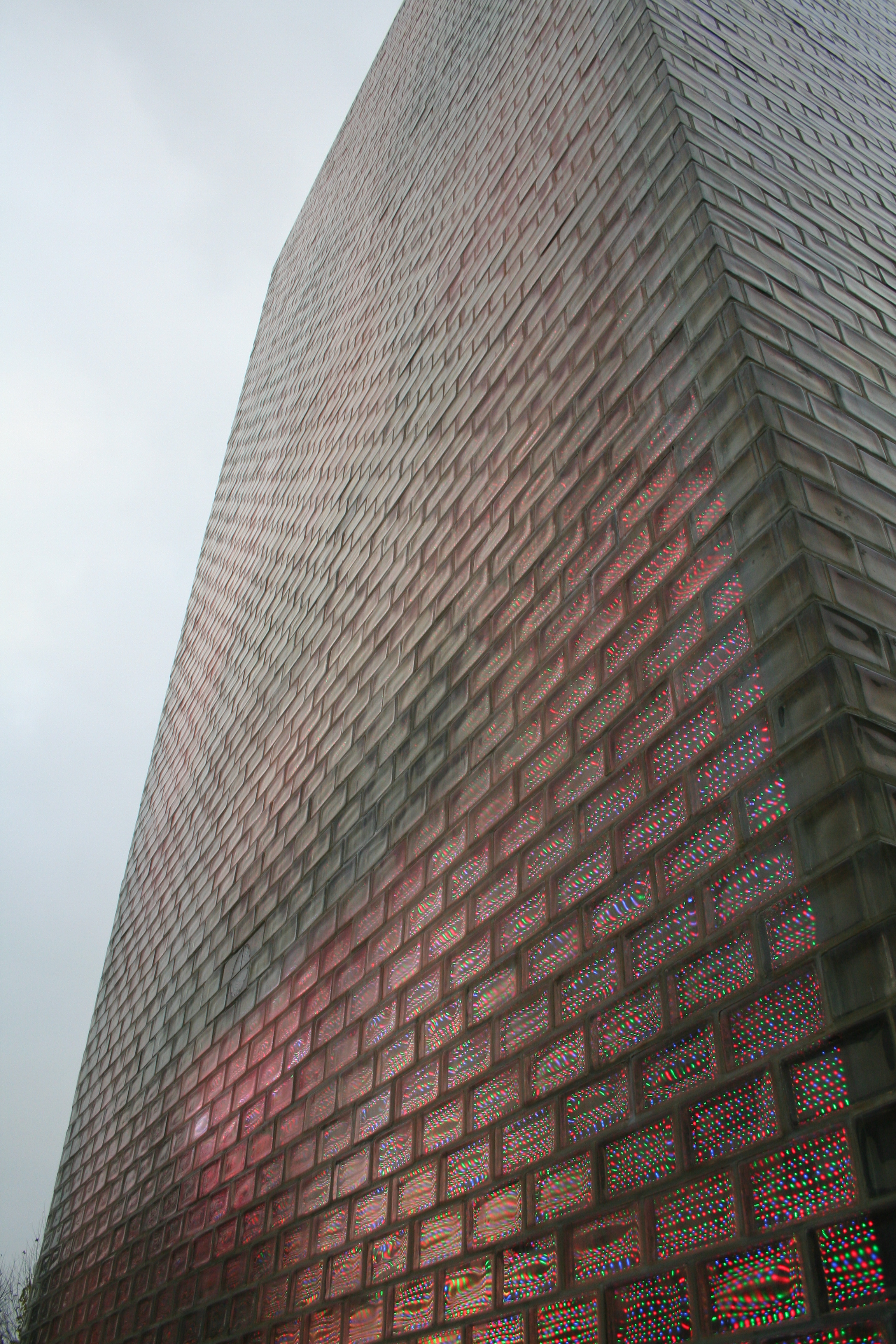 Millennium Park